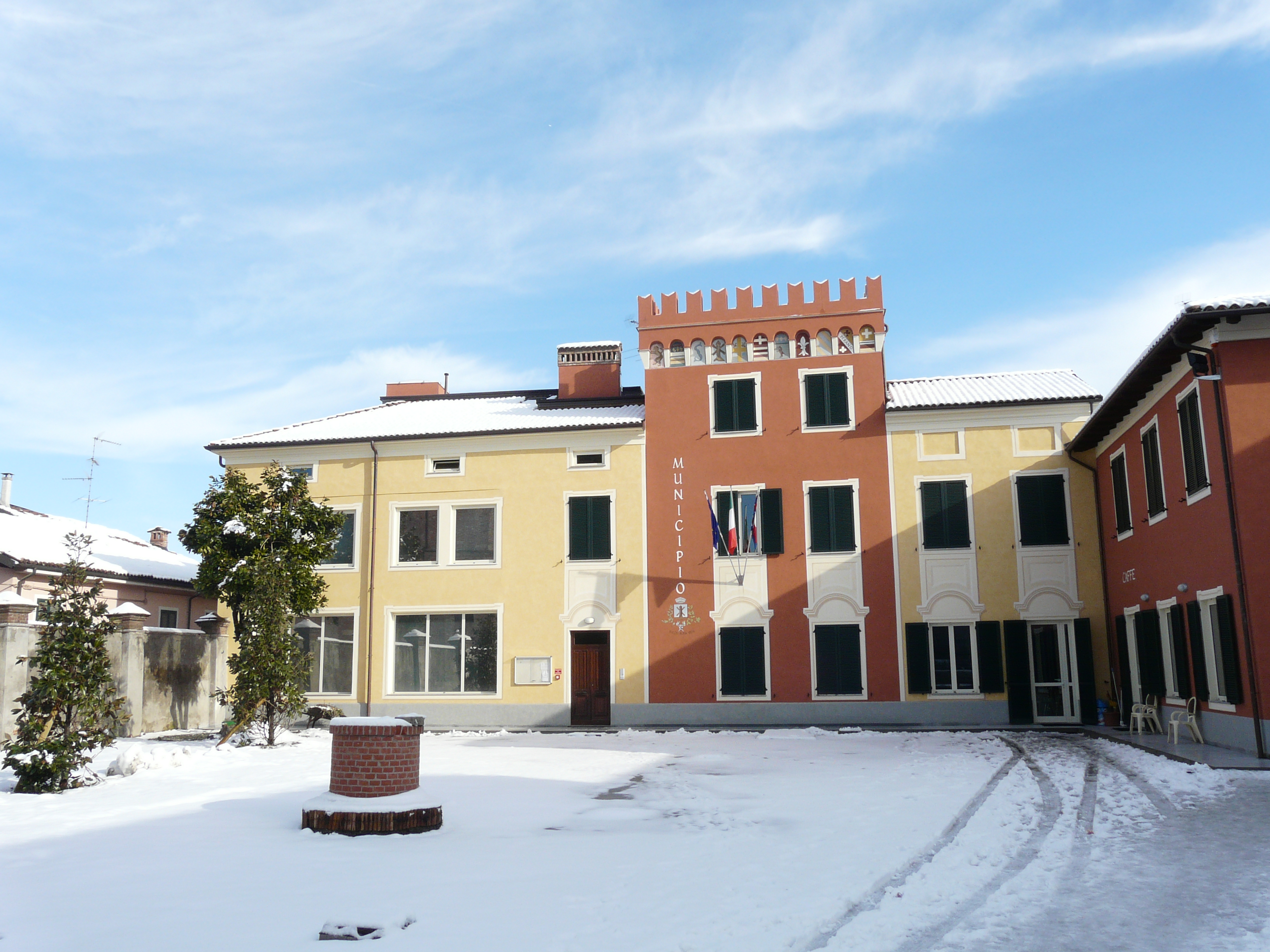 Nuovo municipio di Capriata d'Orba, Piemonte, Italy